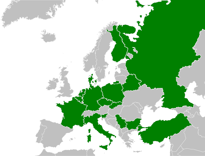 Reprezentacje biorące udział w Mistrzostwach Europy w Piłce Siatkowej Mężczyzn 2013.